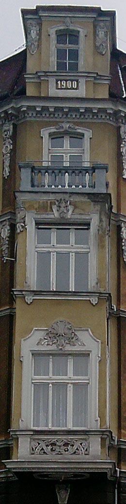 Racibórz, ul. Ogrodowa 32 - kamienica